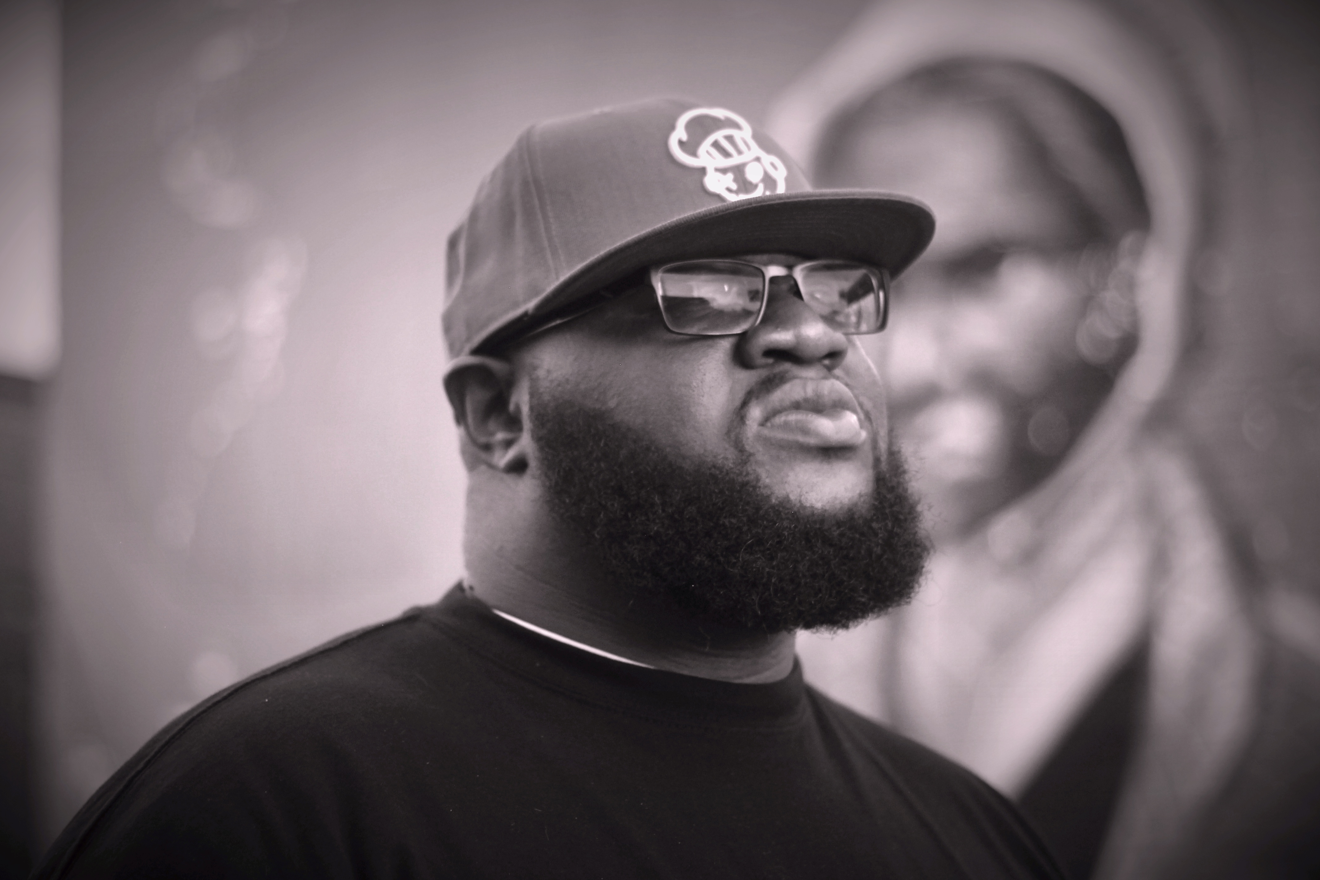 Fatt Father